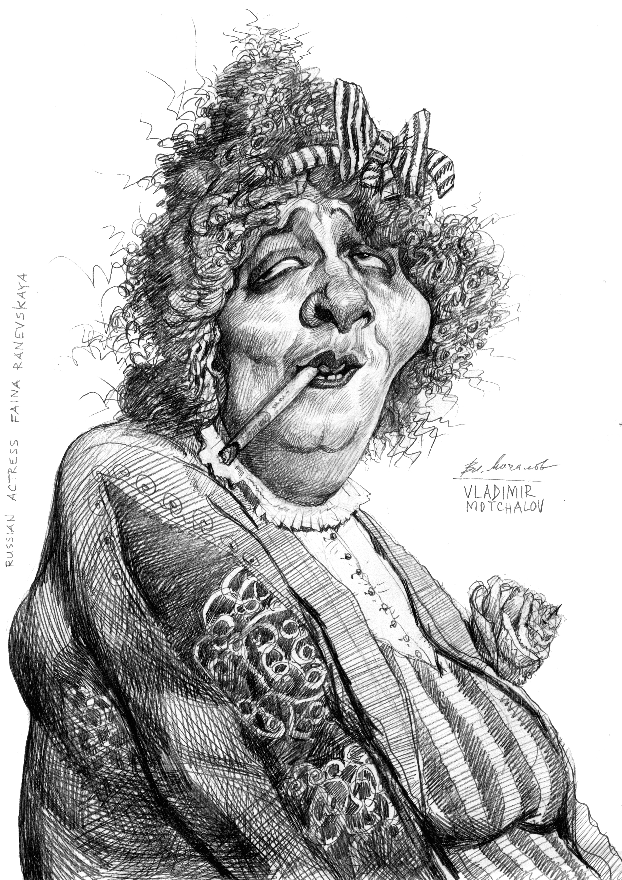 Фаина Раневская . Графика